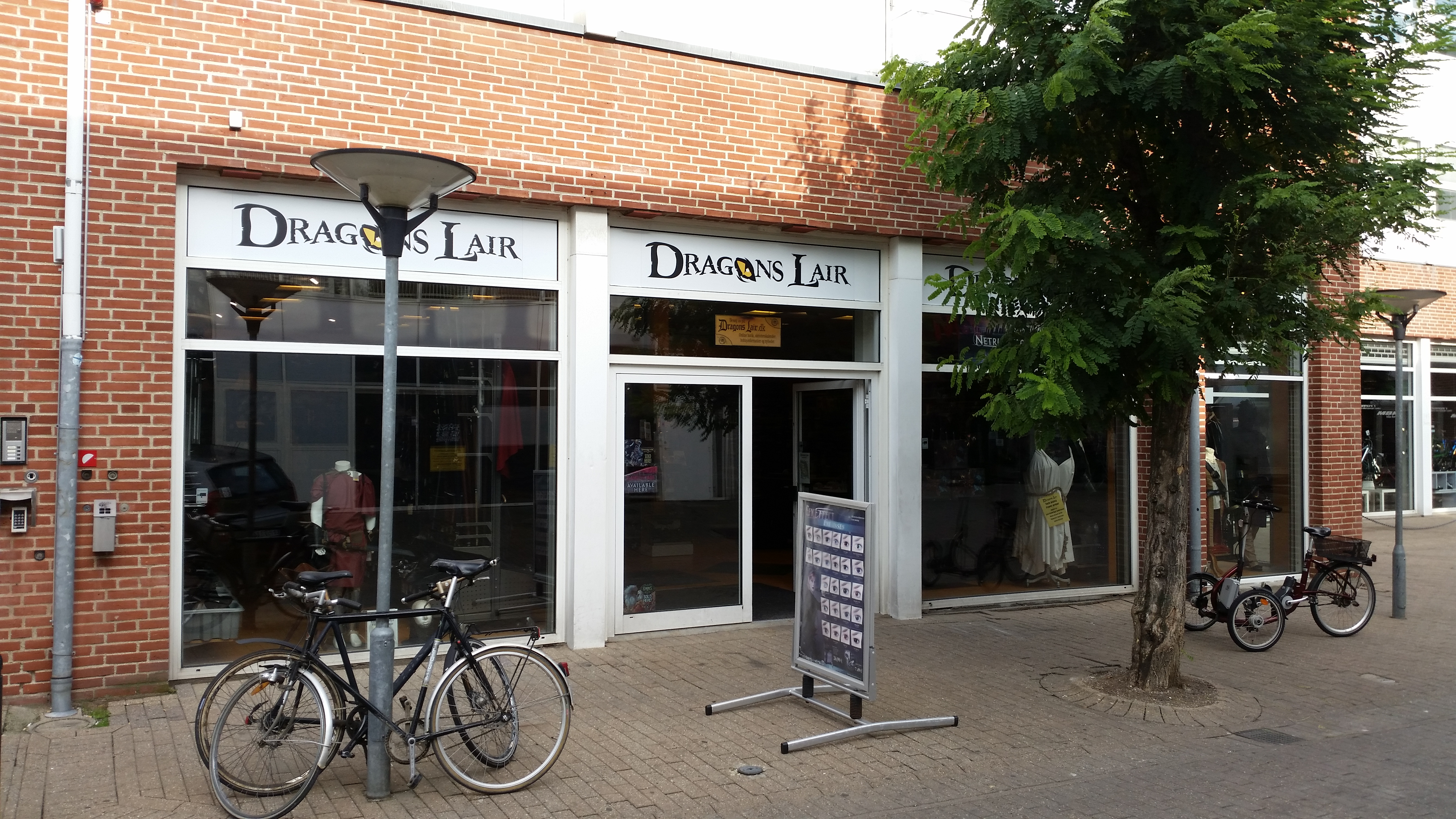 Billedet er taget i 2014, lige efter renoveringen og indførelsen af det nye logo for kæden.